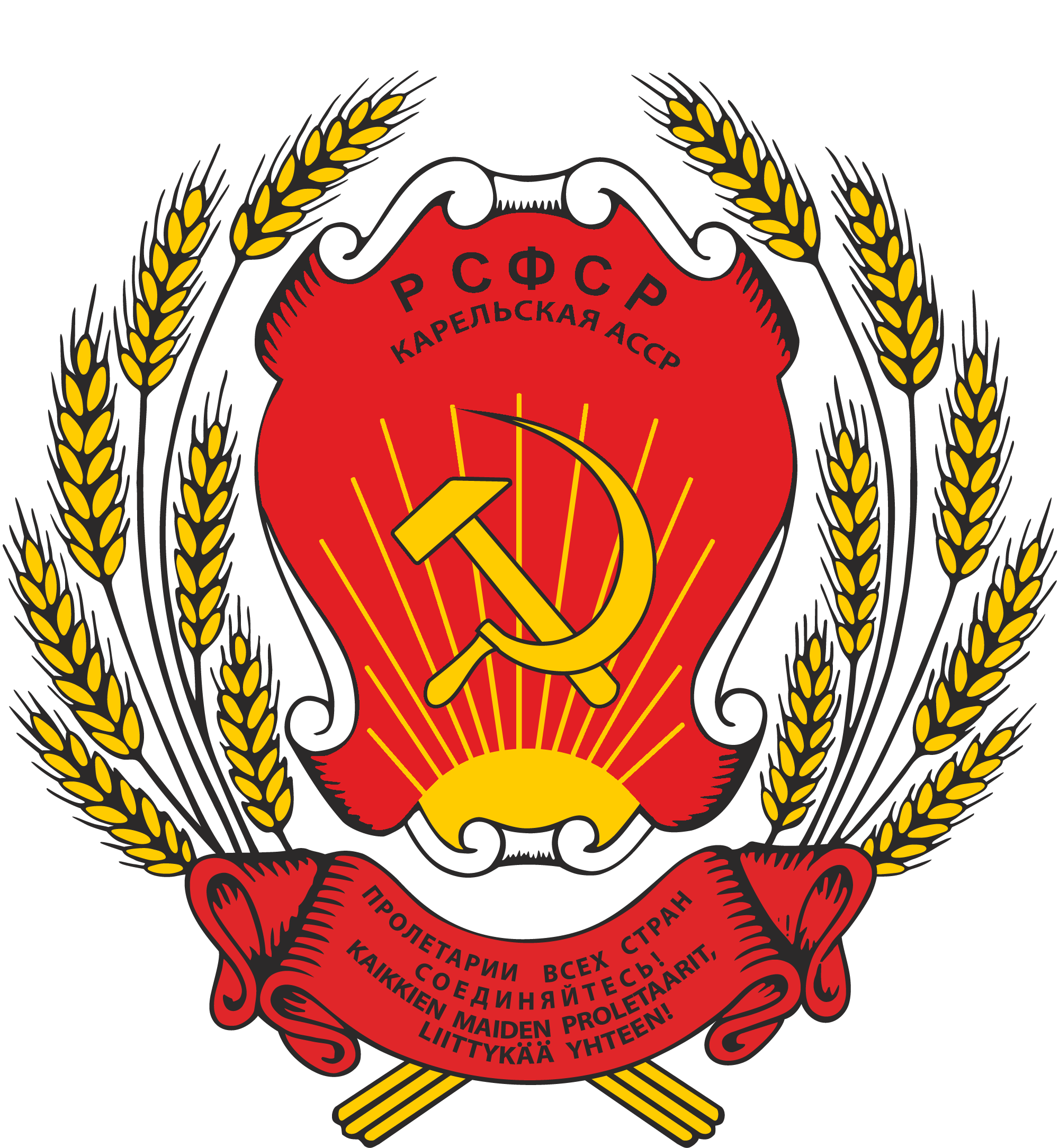 Герб Карельской АССР в 1956-1978 гг.